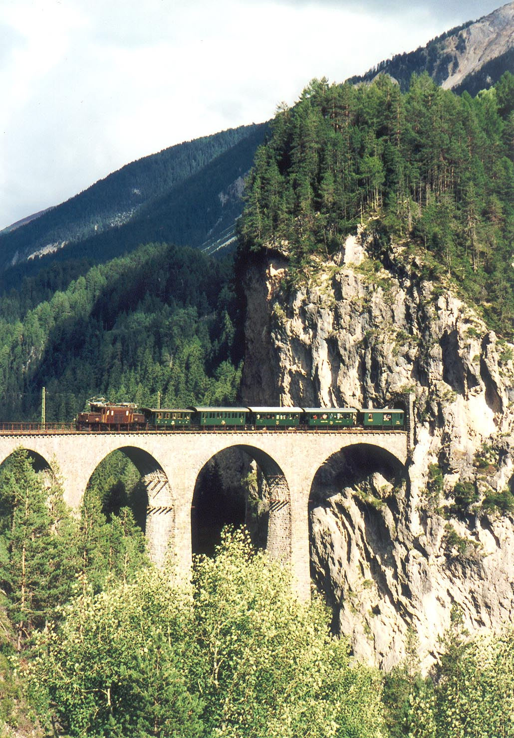 Landwasserský viadukt u Filisuru - jedno z nejznámějších míst Rhétské dráhy. Snímek z roku 2003 s historickým vlakem.